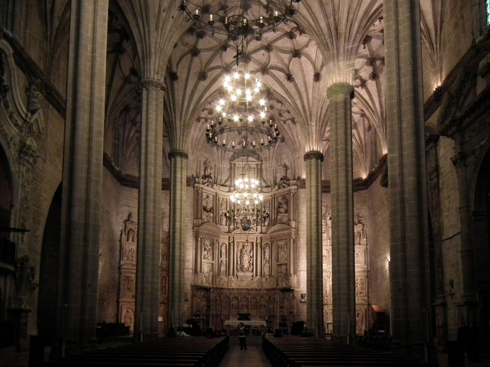 Interior of the Catedral de Santa María de la Asunción, Barbastro, Huesca, Spain